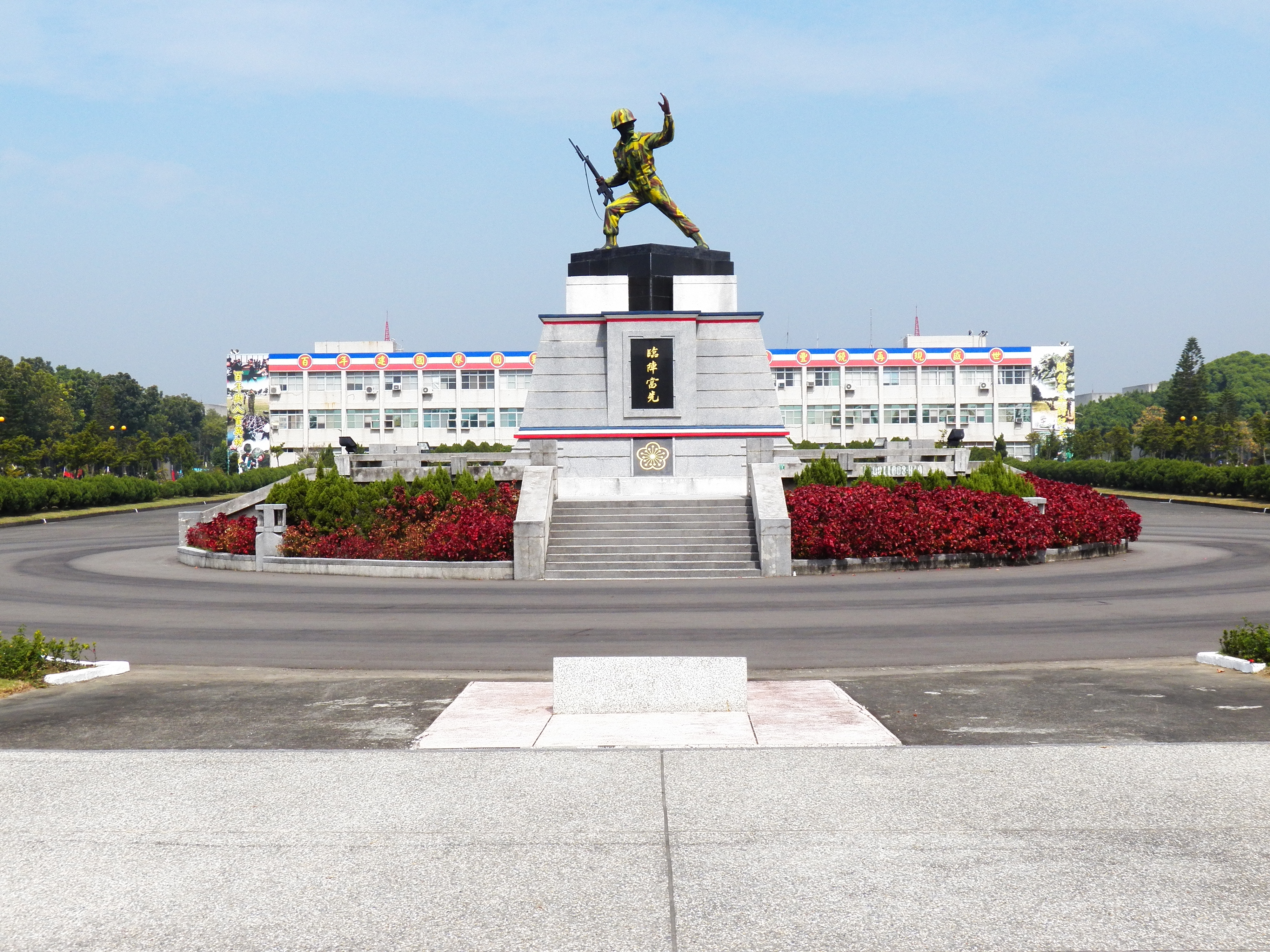 陸軍步兵學校精神堡壘“臨陣當先”，後方是指揮部大樓。